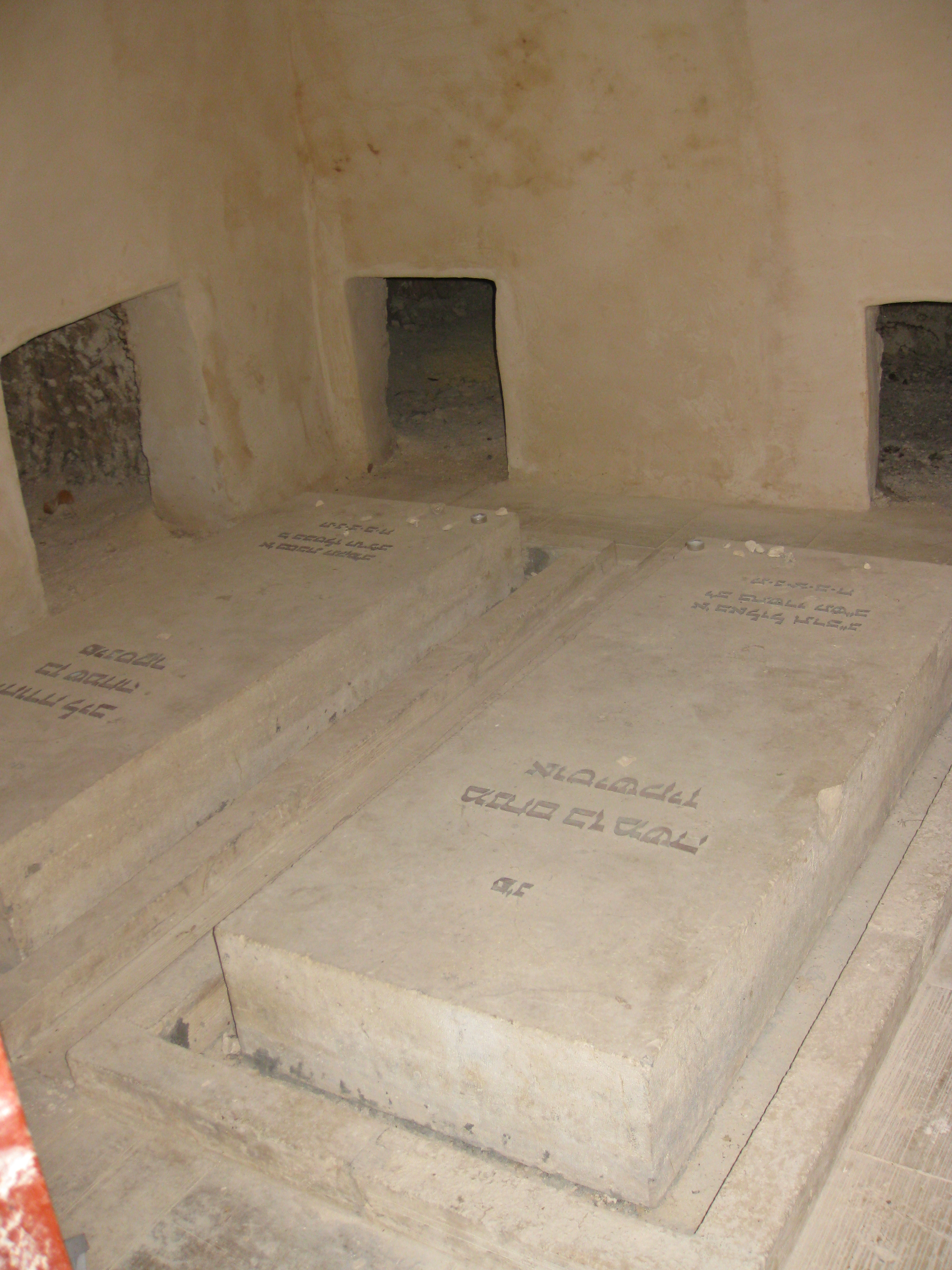 Mount Scopus הר הצופים